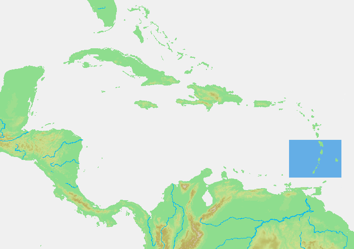 Caribbean - Bovenwindse eilanden.PNG